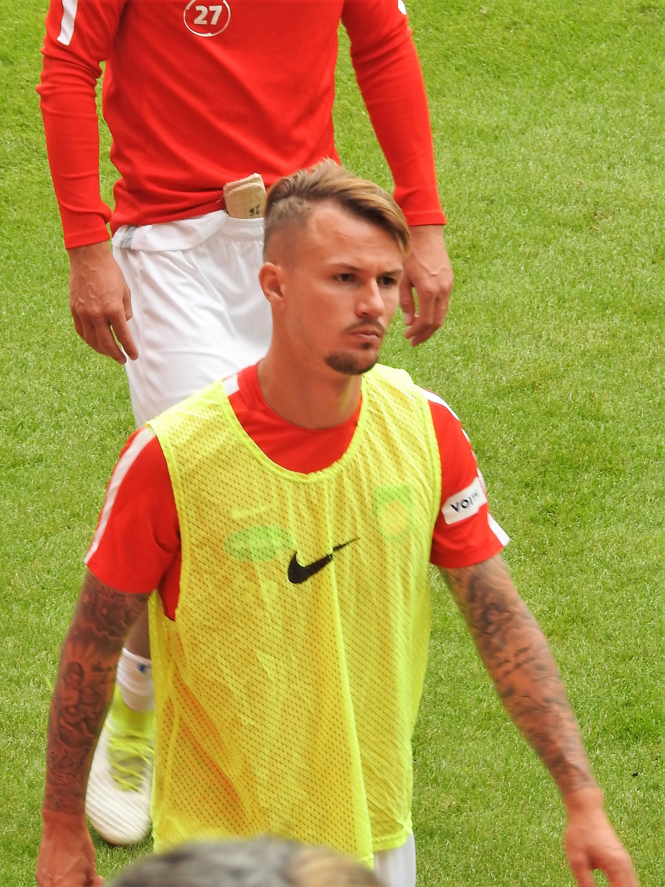 Ronny Philp Heidenheim